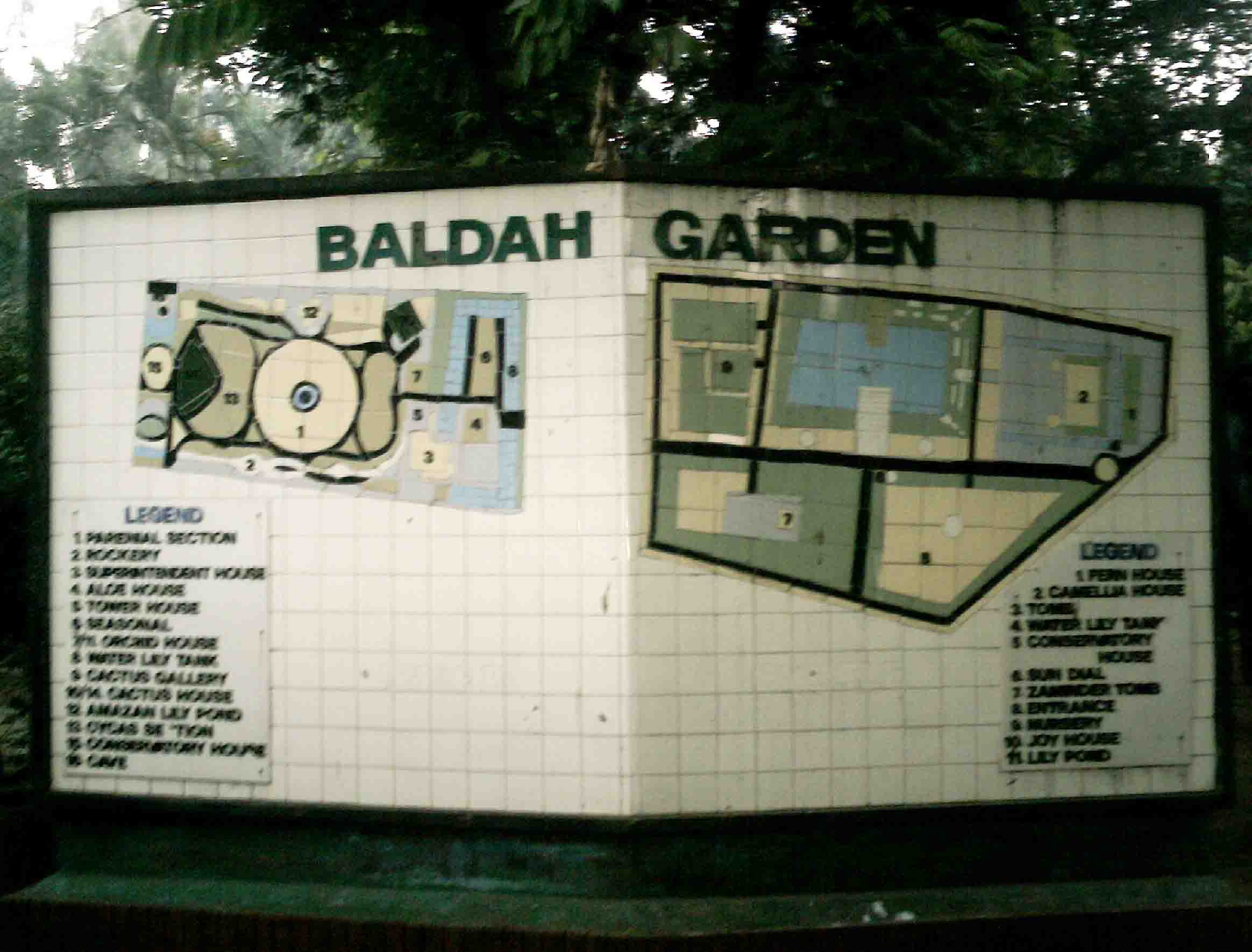 Baldha Garden, Dhaka, Bangladesh.